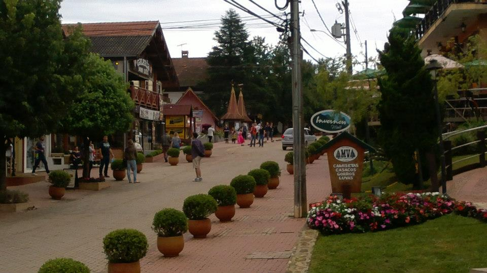 Rua Principal do Distrito